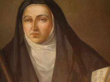 Beata María Antonia de Paz y Figueroa (1730-1799).